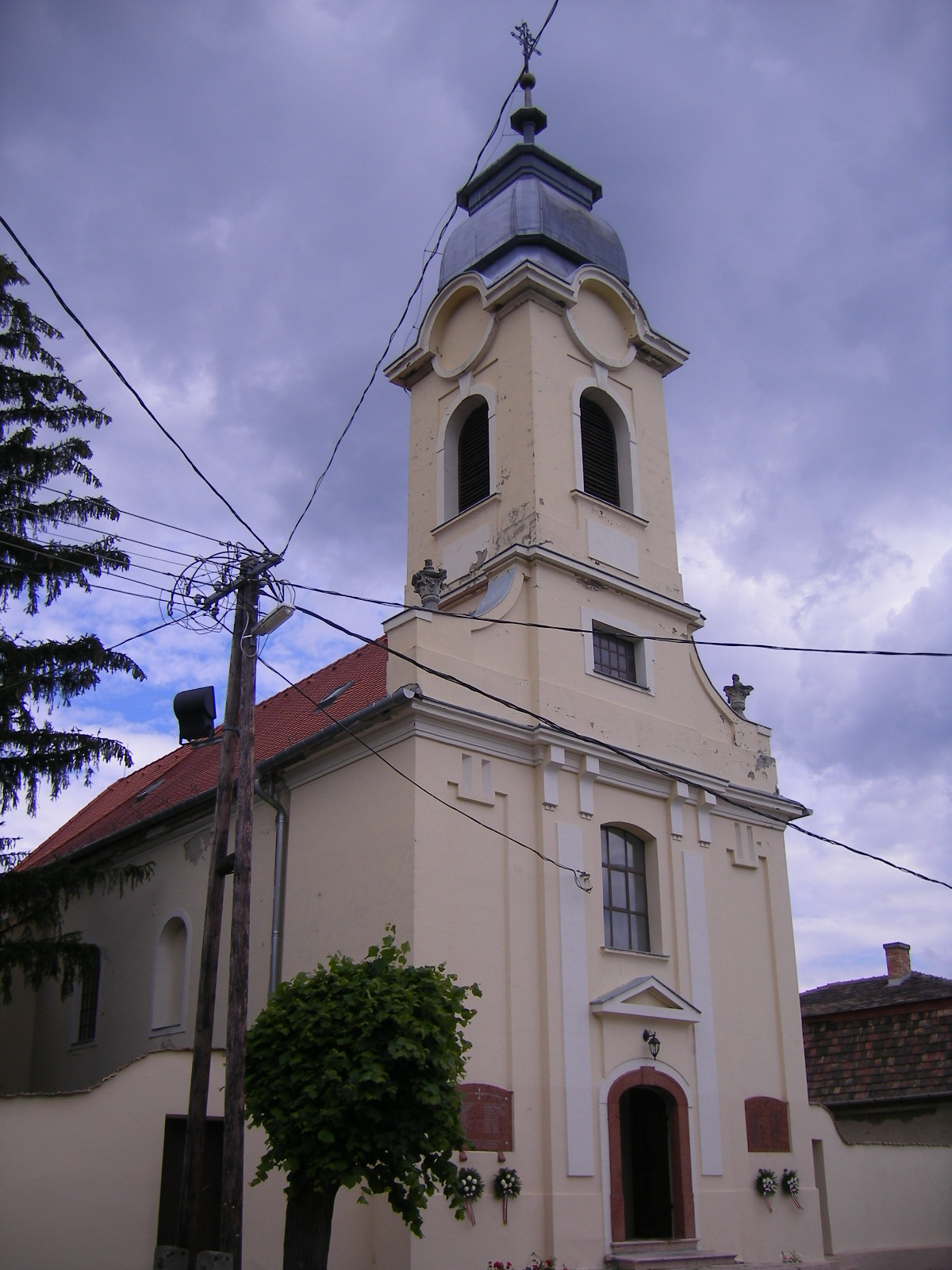 Vértestolna - katolikus templom